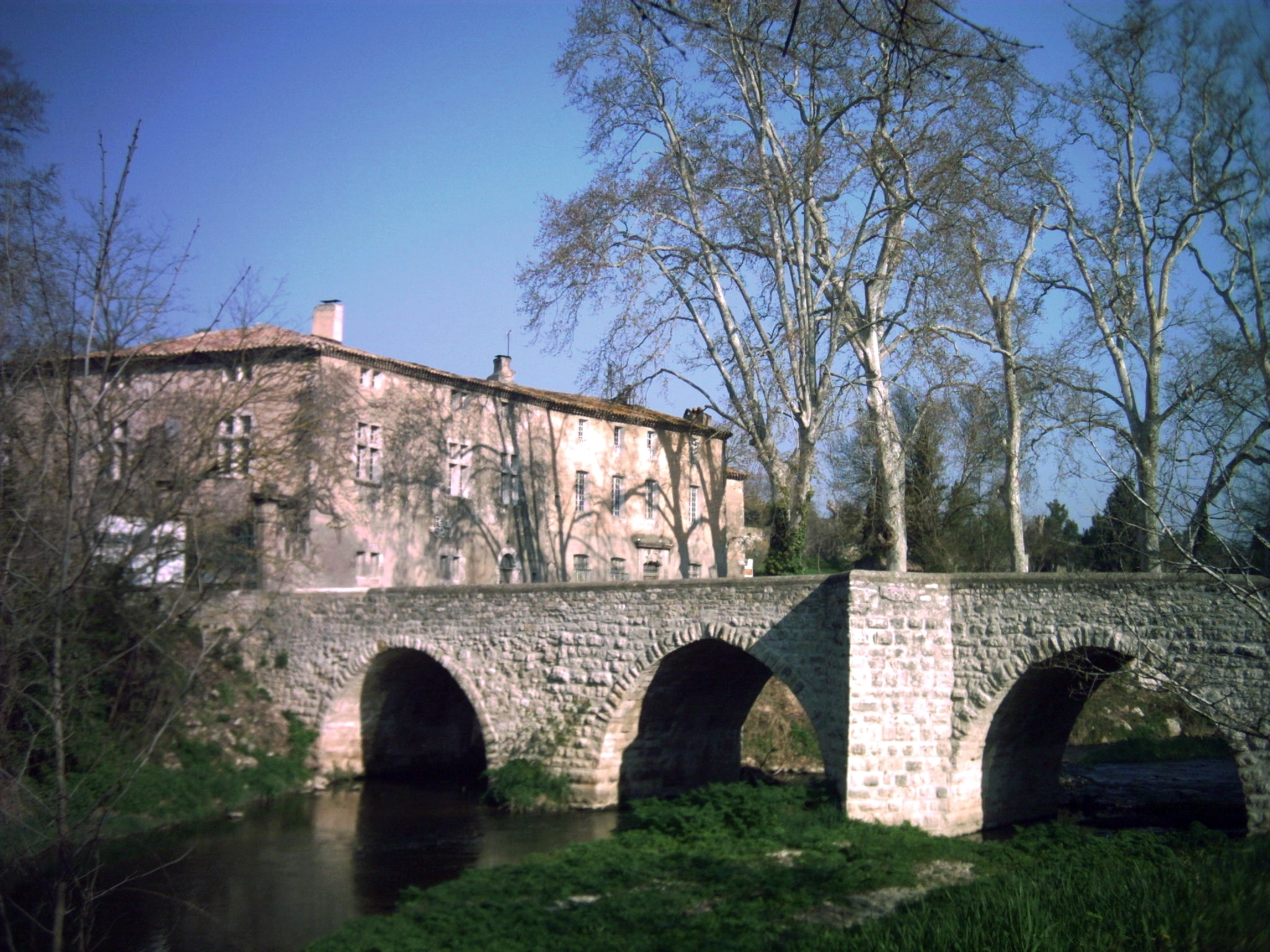 Le site de Saint-Pons : la bâtisse principale et le pont sur l'Arc vus de la route arrivant du sud.